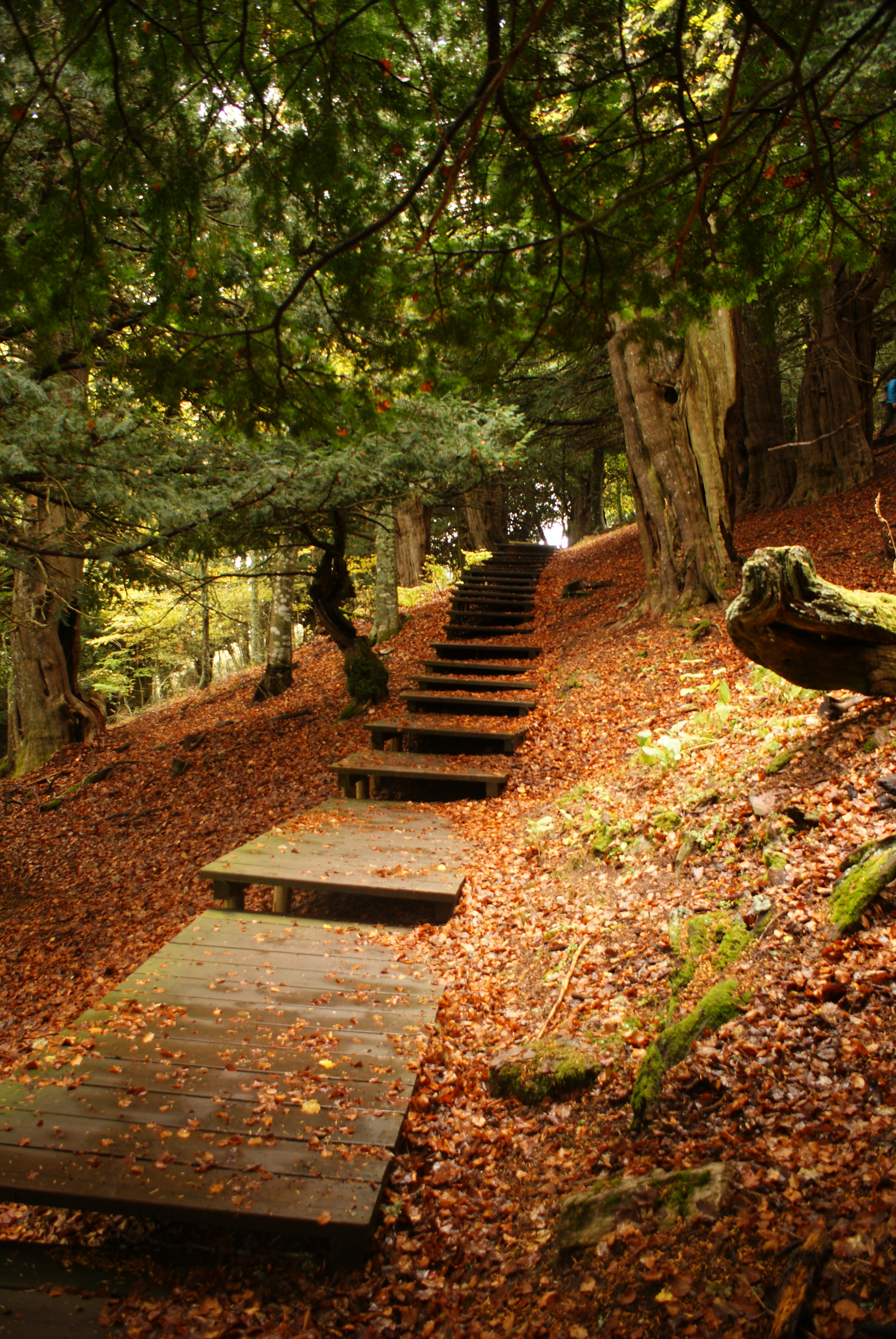 Tejeda de Tosande. Espacio natural de la Provincia de Palencia.